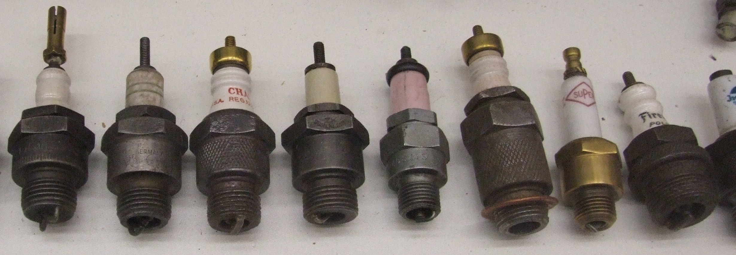 Sammlung historischer Zündkerzen, Teil 2, Museum Autovision, Altlußheim